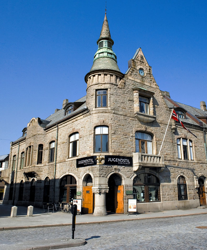 Slightly edited version of Image:Jugendstilsenteret.jpg